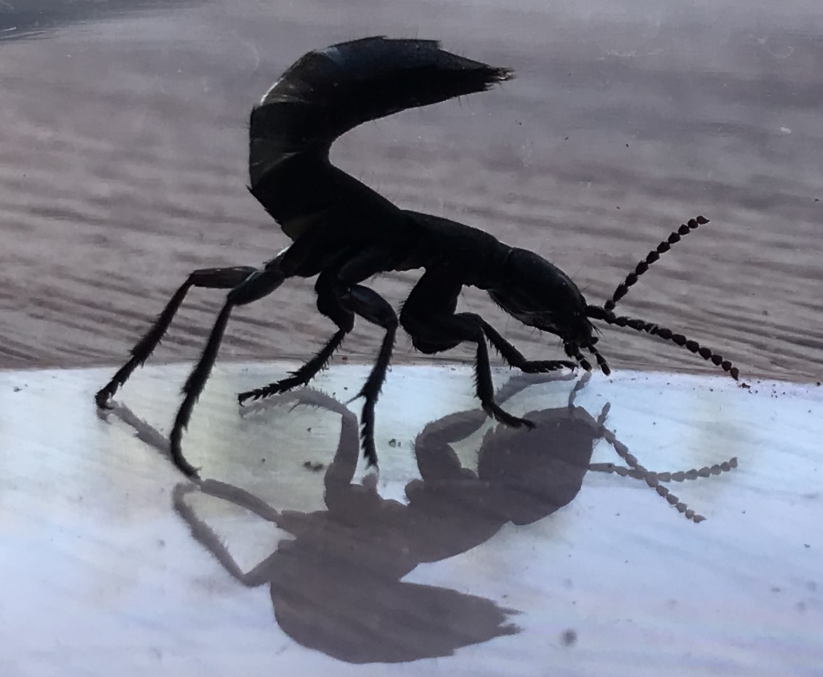 Ocypus olens in Toffen, Bern, Switzerland